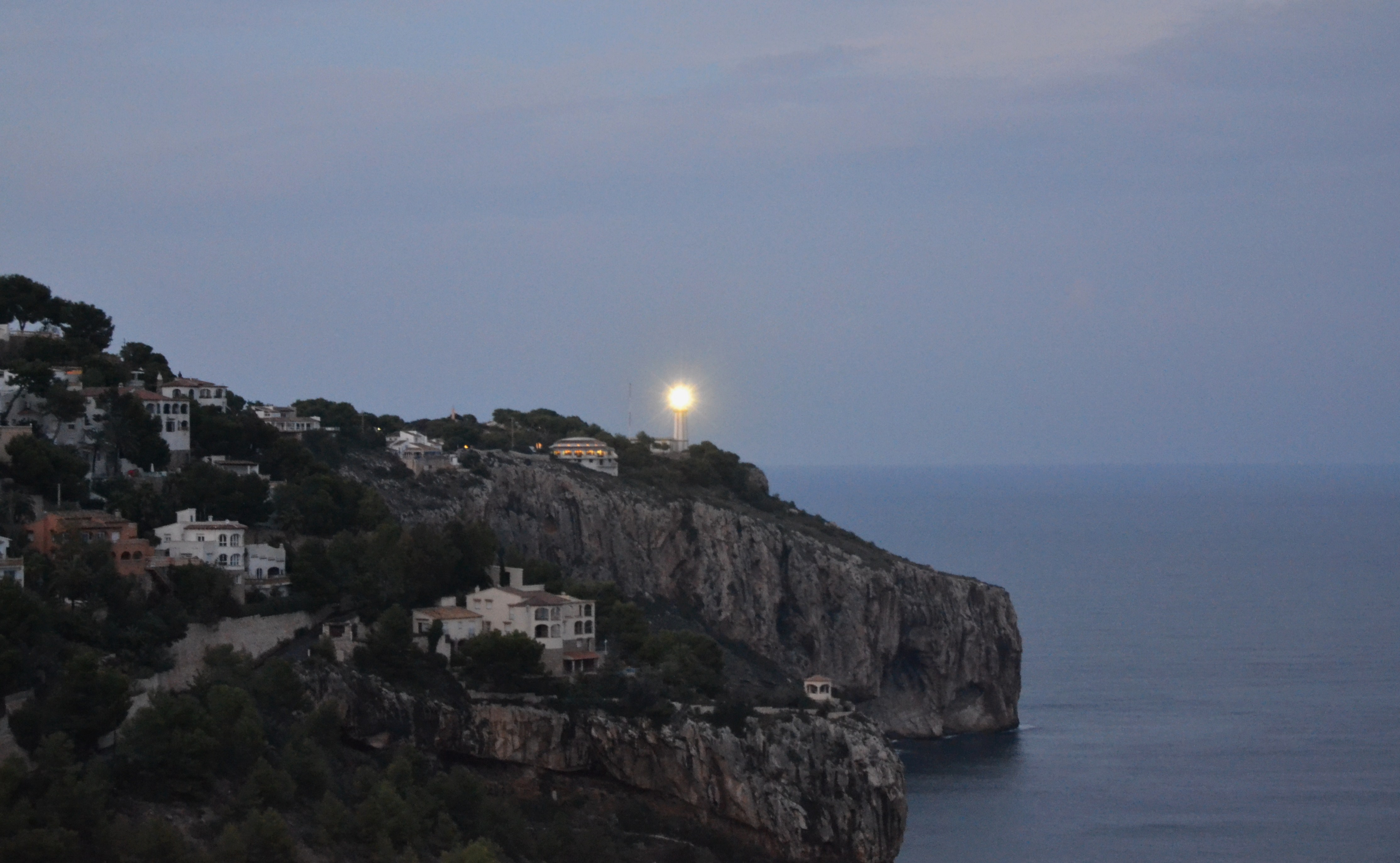 Llum del far del cap de la Nau.